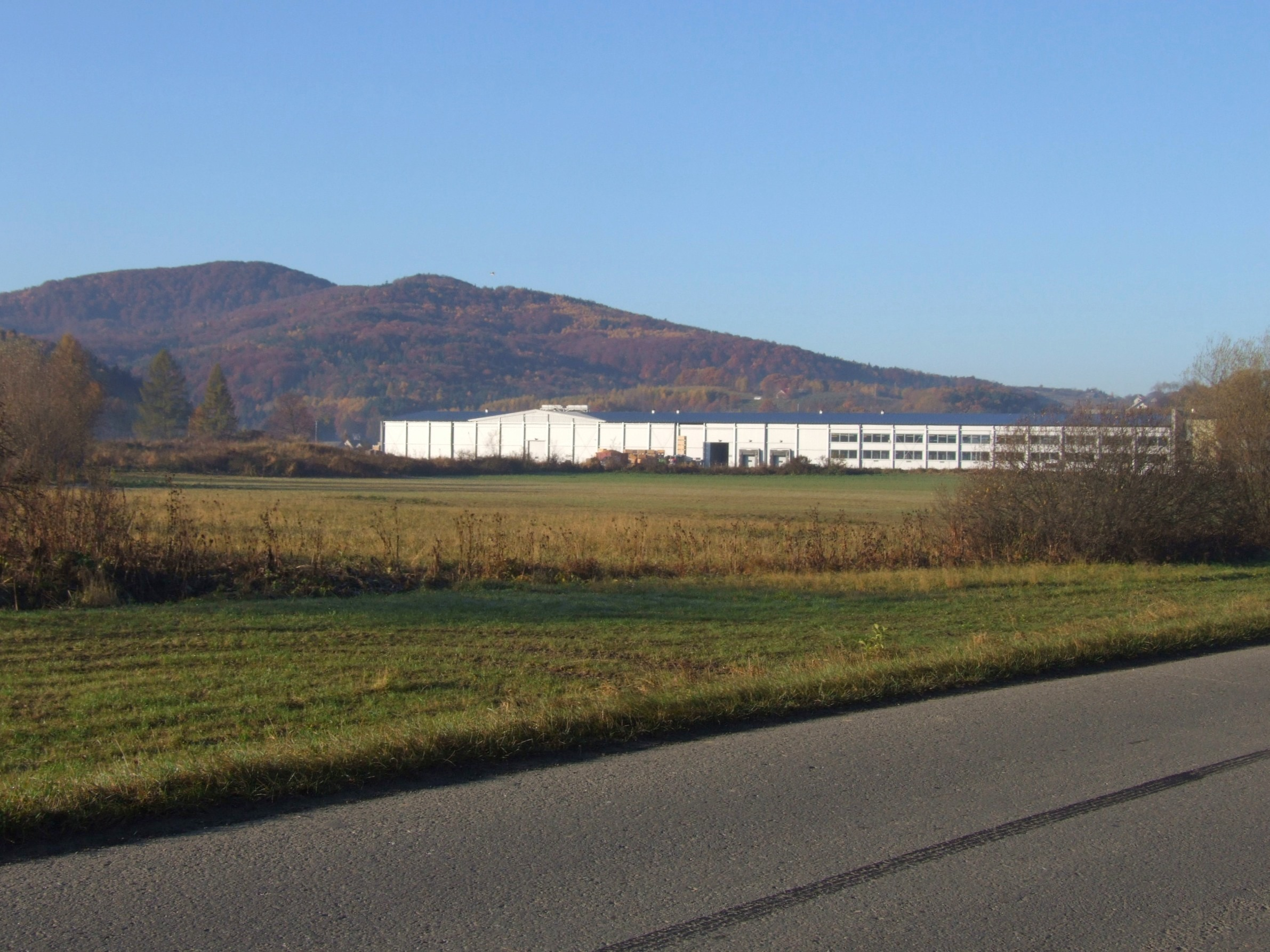 Góra Grodzisko. Na pierwszym planie fabryka opakowań w Zegartowicach